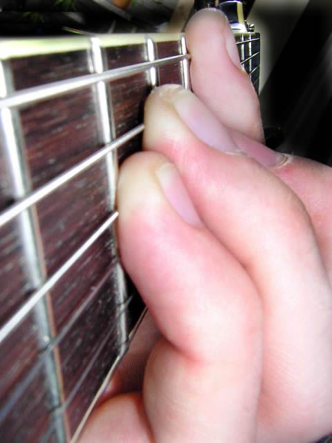 Powerchord